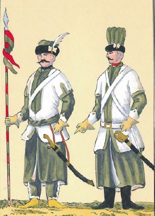 60. Ułan i pocztowy 4 Pułku Ułanów (Bielaka) 4 pułku PS